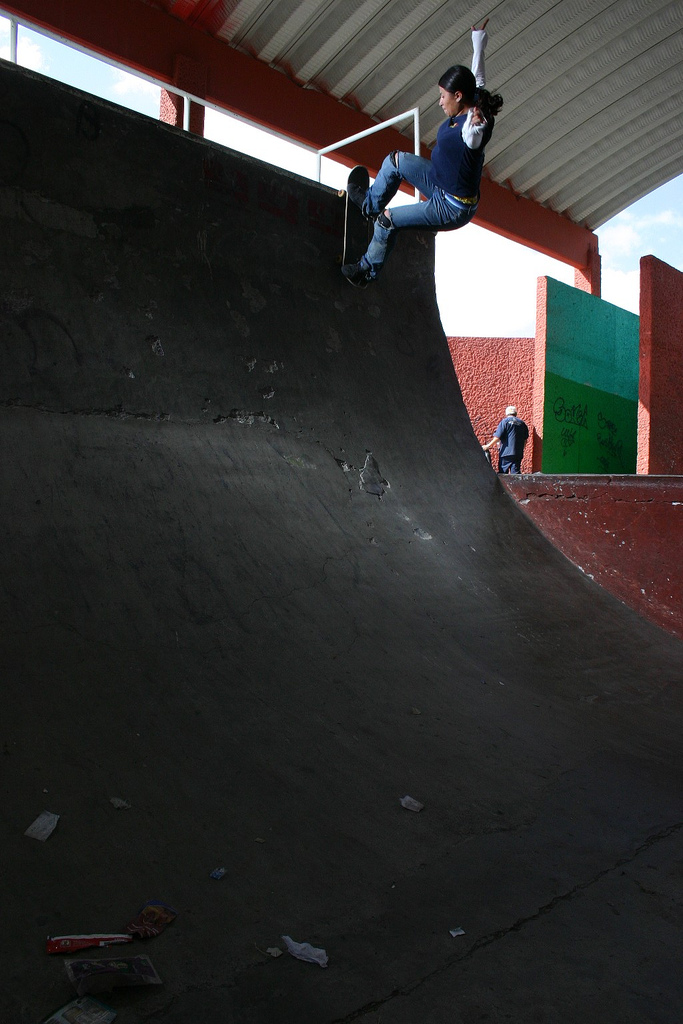 Rock to fakie